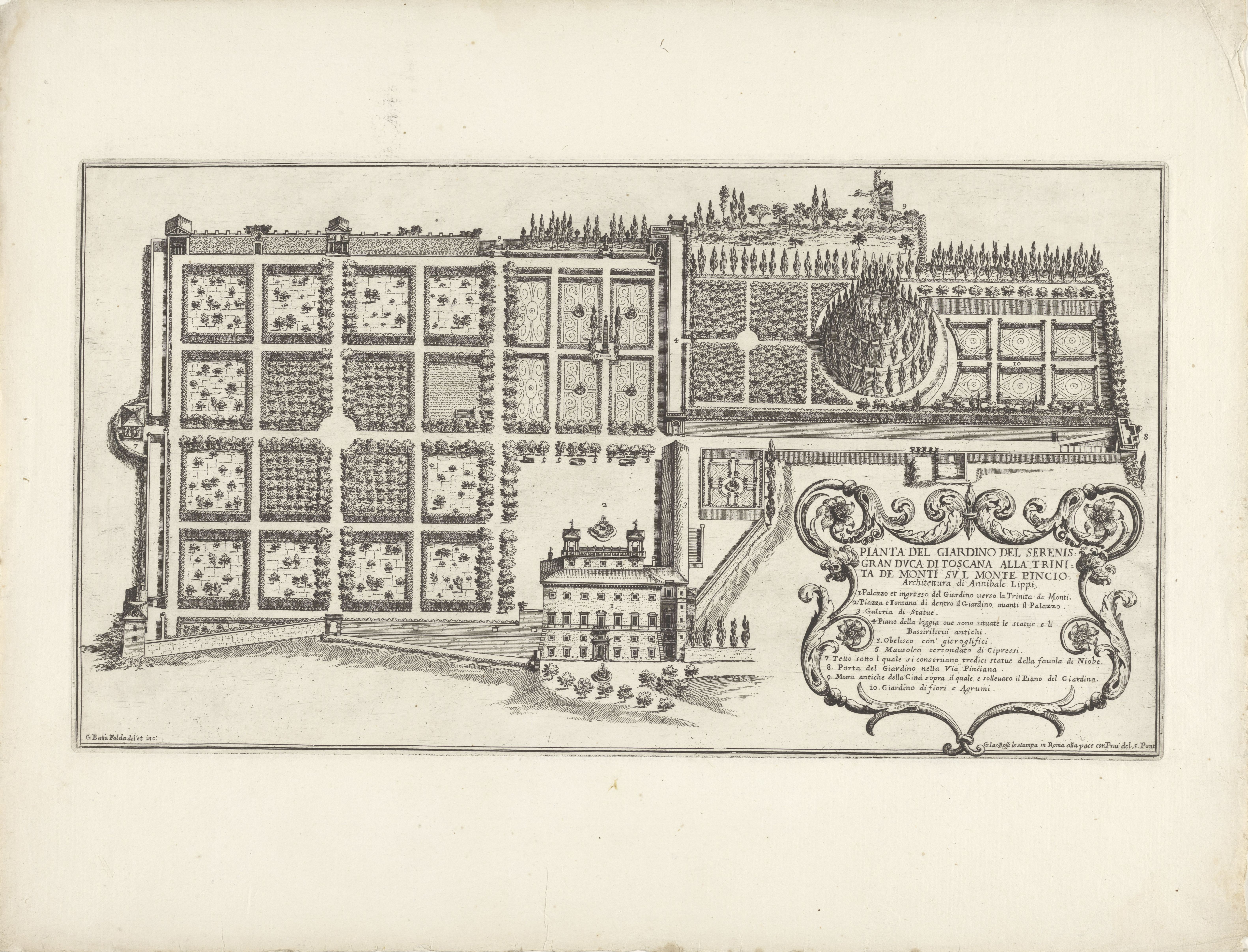 Rechtsonder een cartouche met titel en een verklarende lijst met nummers.